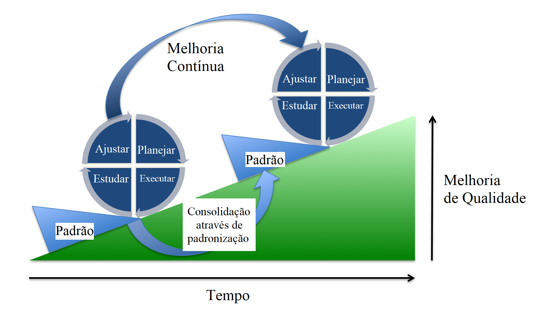 Tradução e adaptação da imagem "By Johannes Vietze - Own work, CC BY-SA 3.0, do ciclo de PDSA (versão mais recente do ciclo de PDCA.